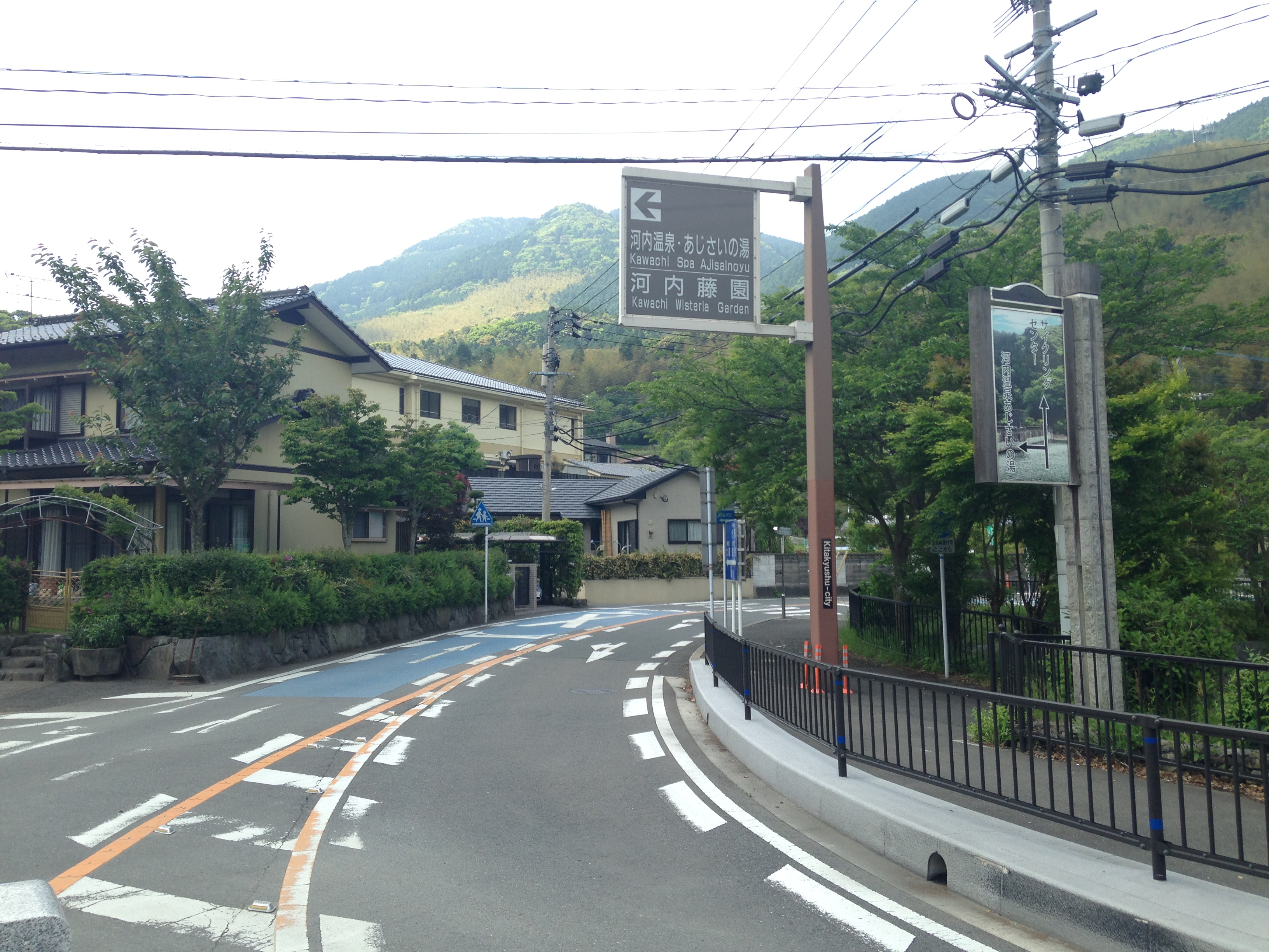 中河内橋西側の福岡県道62号。奥は皿倉山